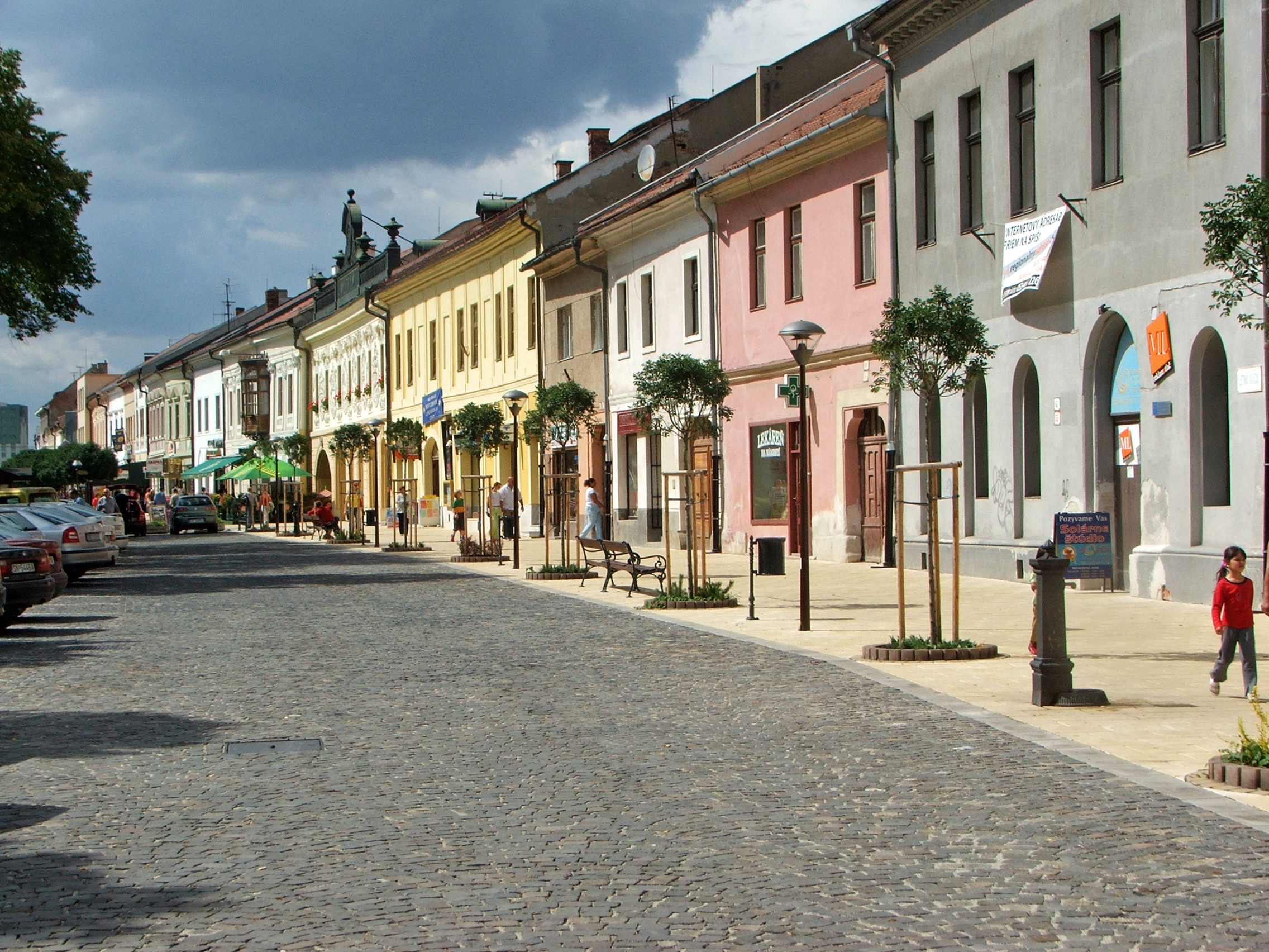 Street in Spišská Nová Ves centrum